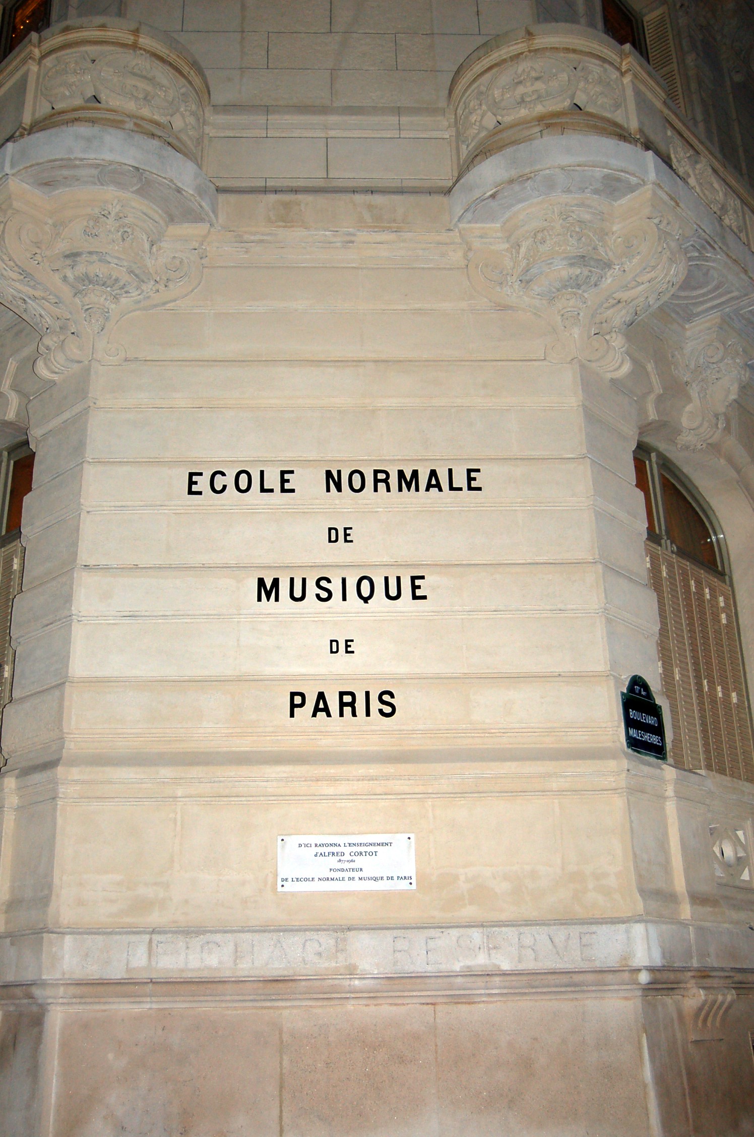 Façade de l'Ecole Normale de Musique de Paris